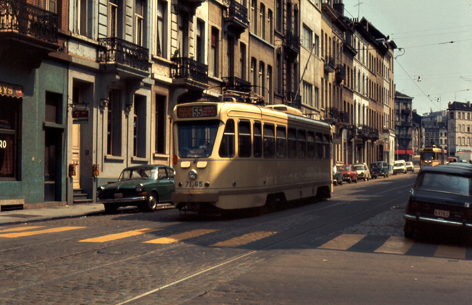 PCC in Brussel